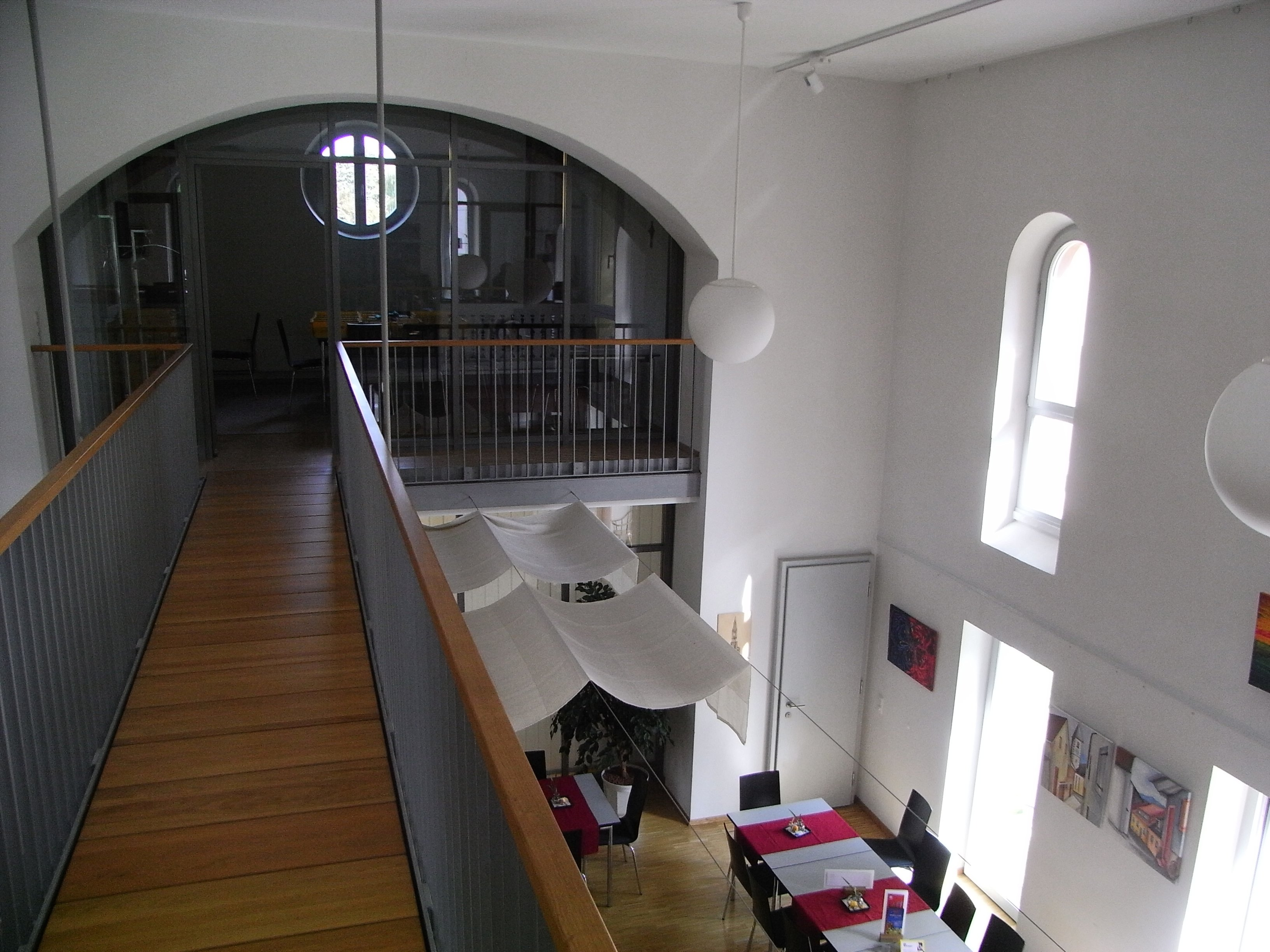 Das innere der St Michaelskapelle. seit 2007 in neuer Nutzung für caritative Zwecke und einem Kaffee, welches von Behinderten und nicht behinderten betrieben wird und ein soziales Zentrum im ort bildet